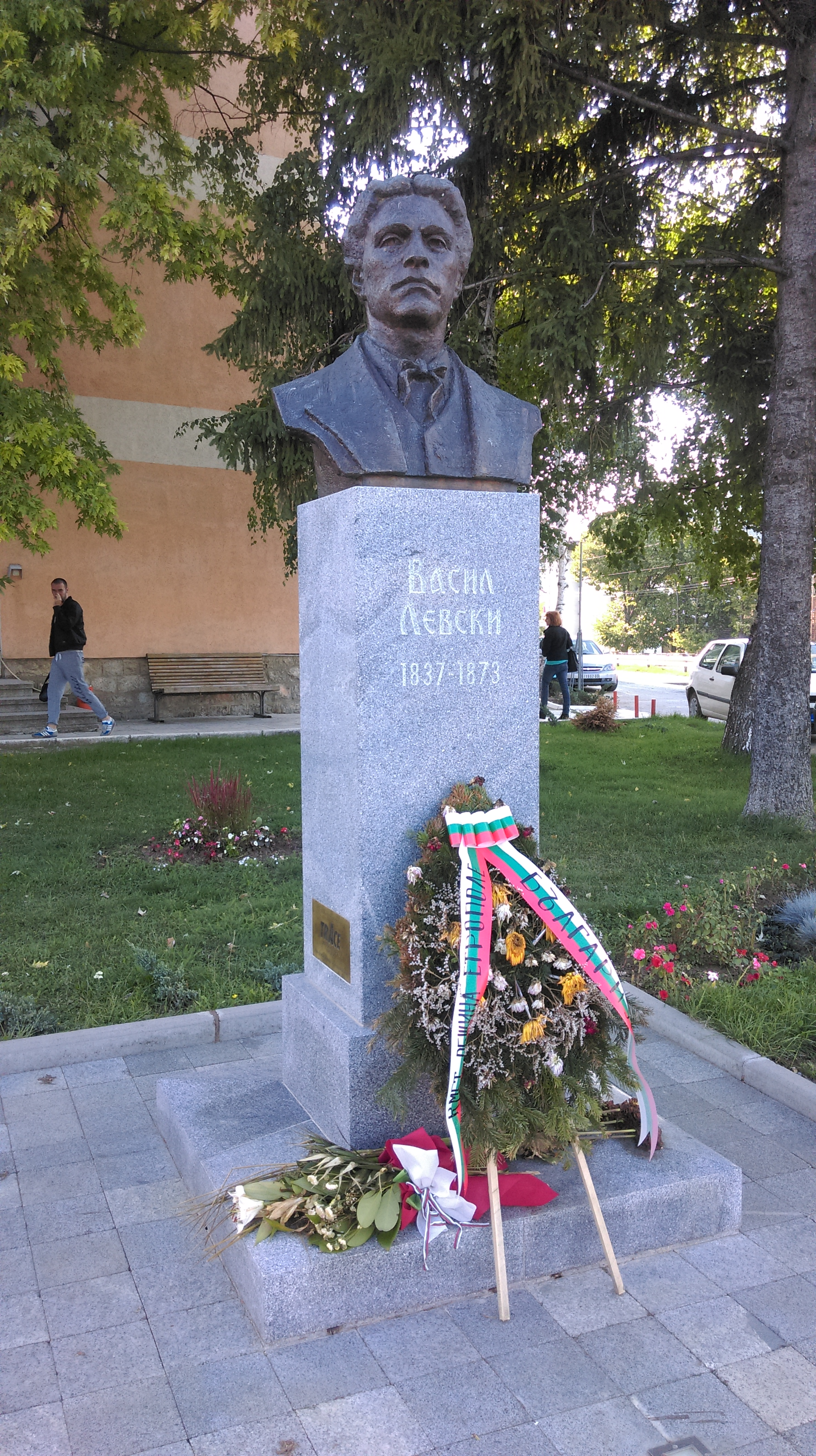 Bista Vasila Levskog, Dimitrovgrad